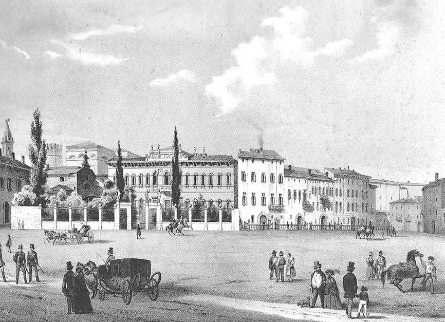 Piazza Cittadella a Verona i una litografia del 1850 circa